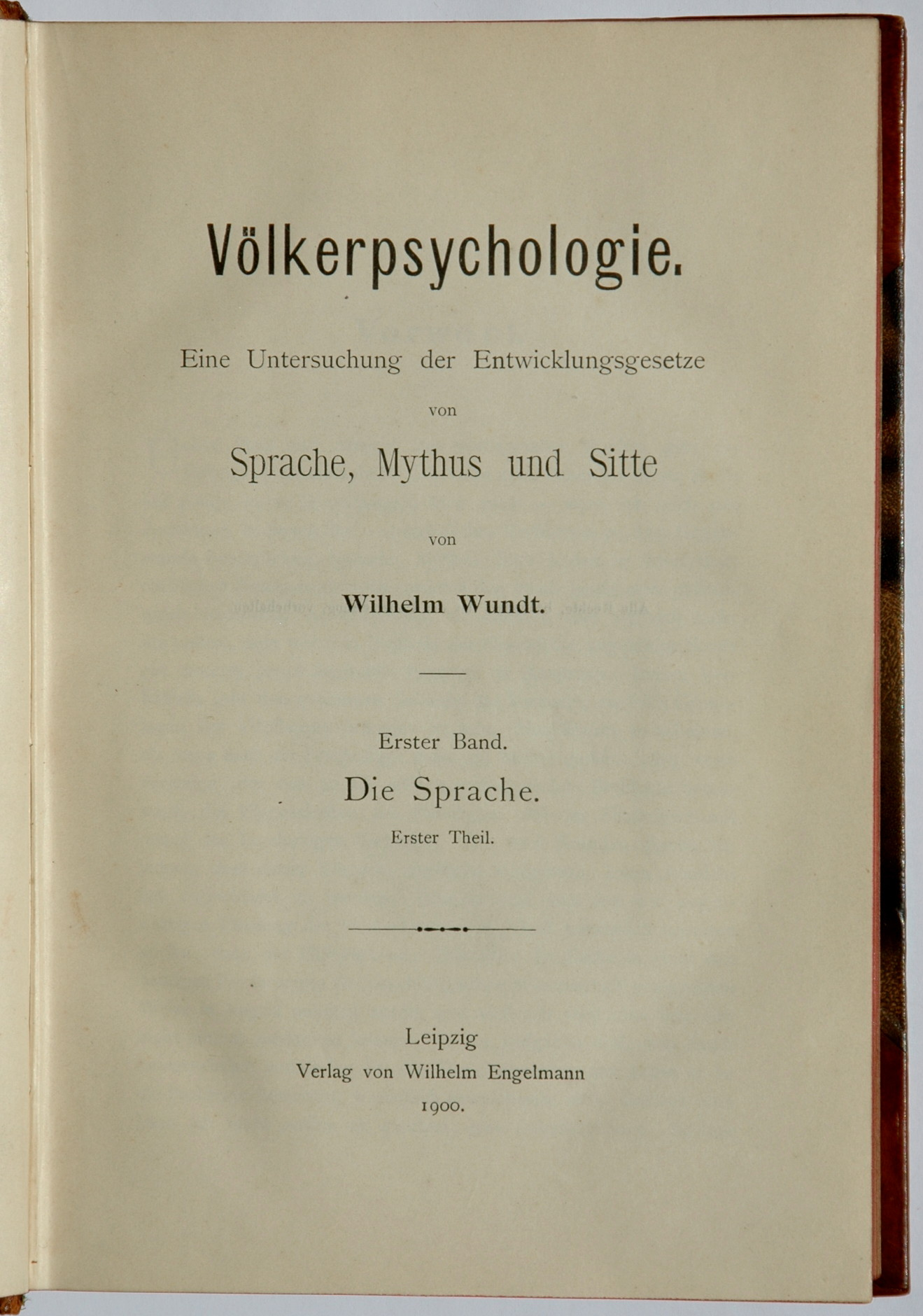 Titelblatt der Erstausgabe